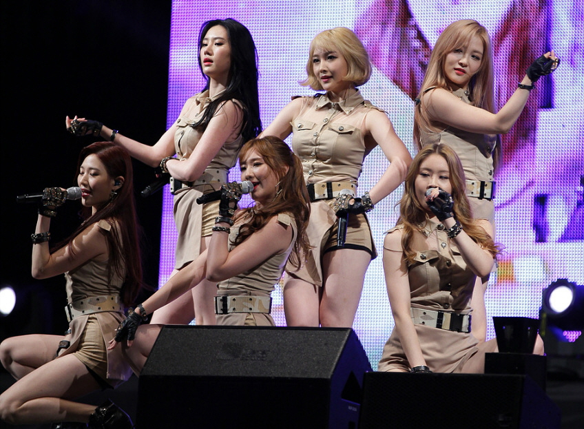 워너비(WANNA.B) 홍천 군인의날 화합한마당